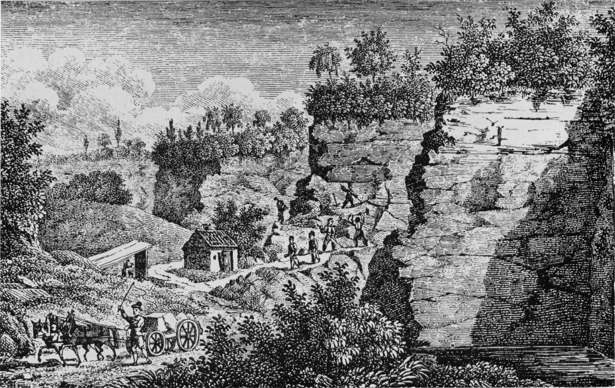 Steinbrüche bei Heilbronn um 1835. Steindruck der Gebrüder Wolff, Historisches Museum Heilbronn